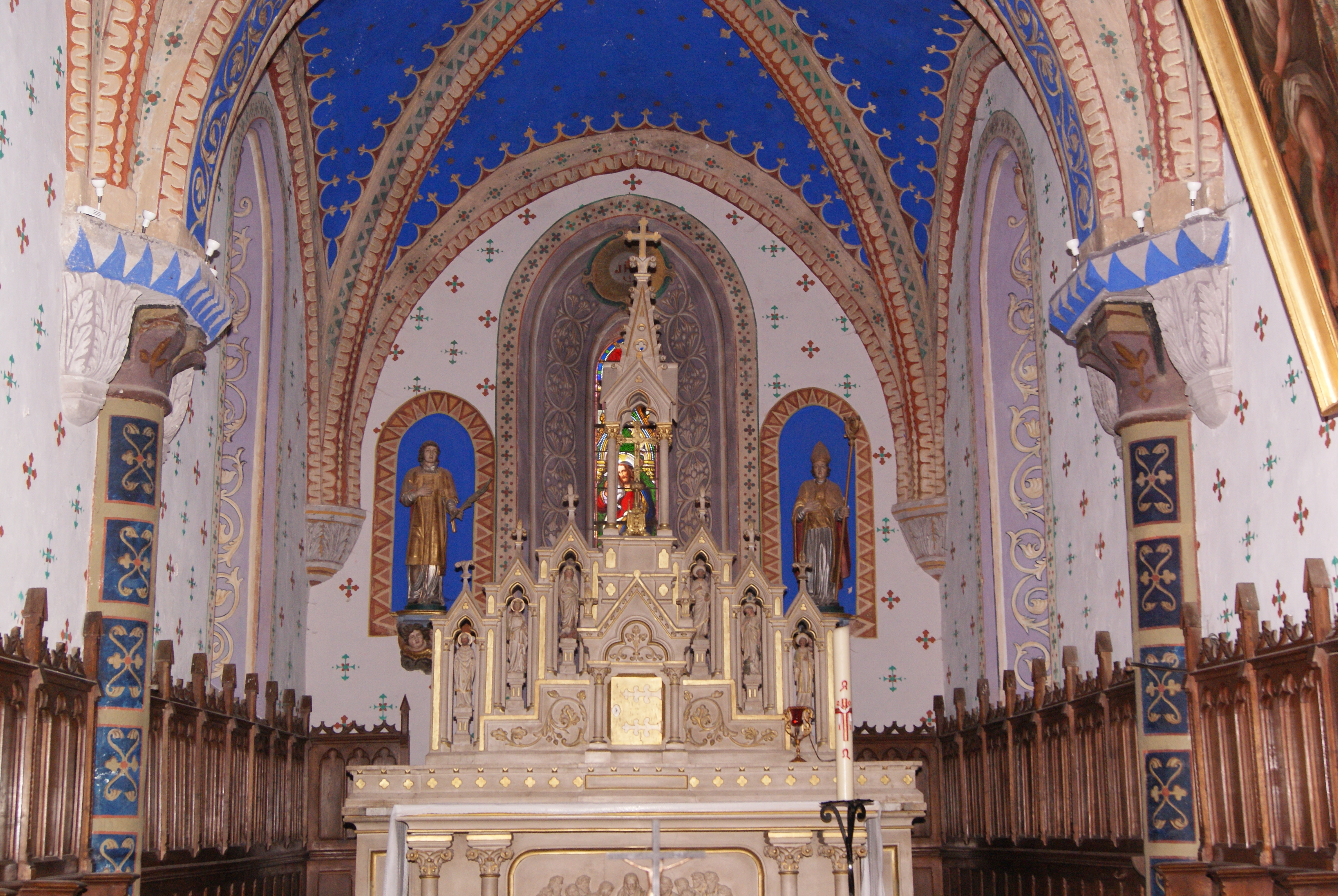 Choeur de l'église